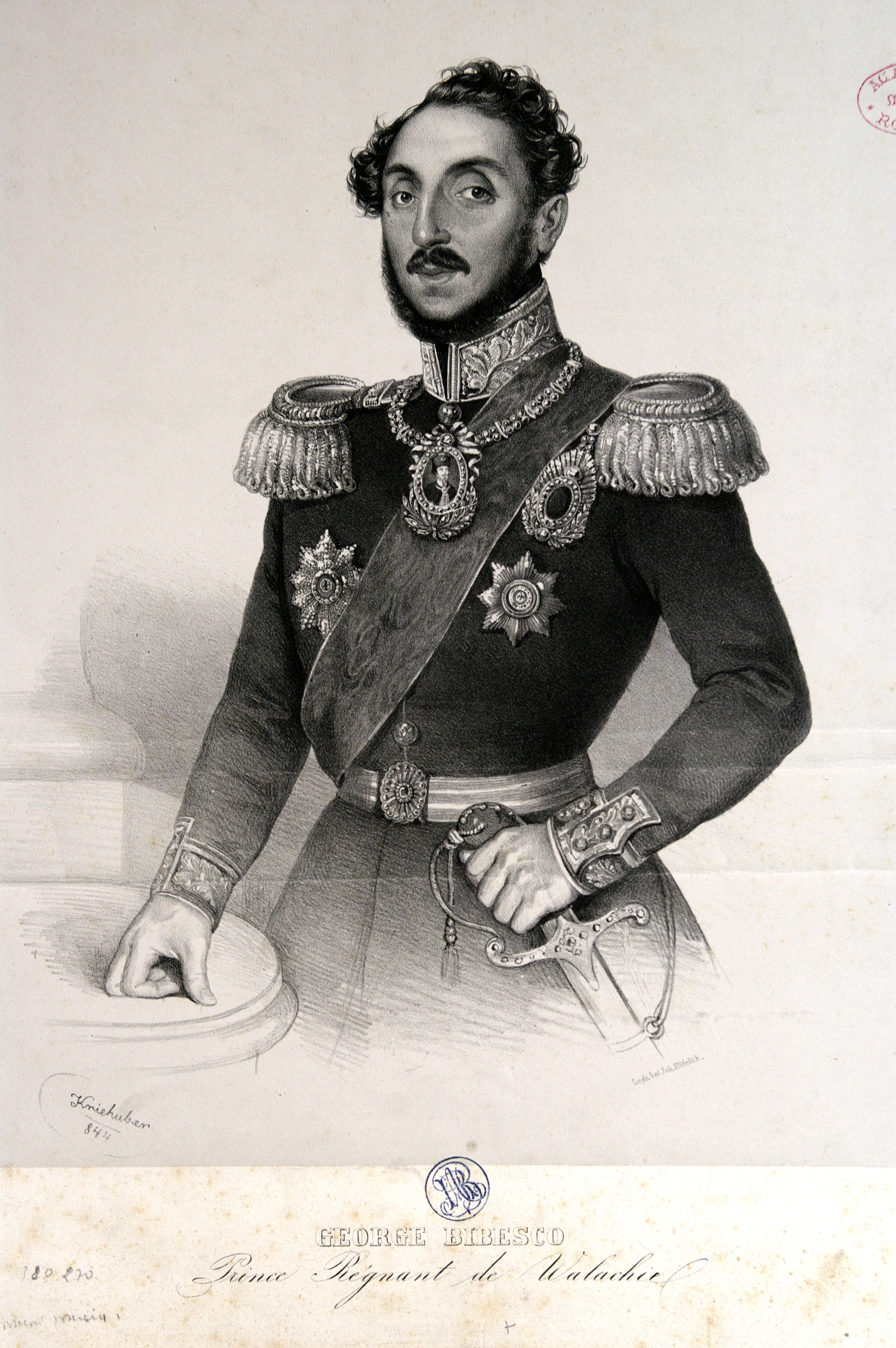 Prince régnant de Walachie - George Bibesco